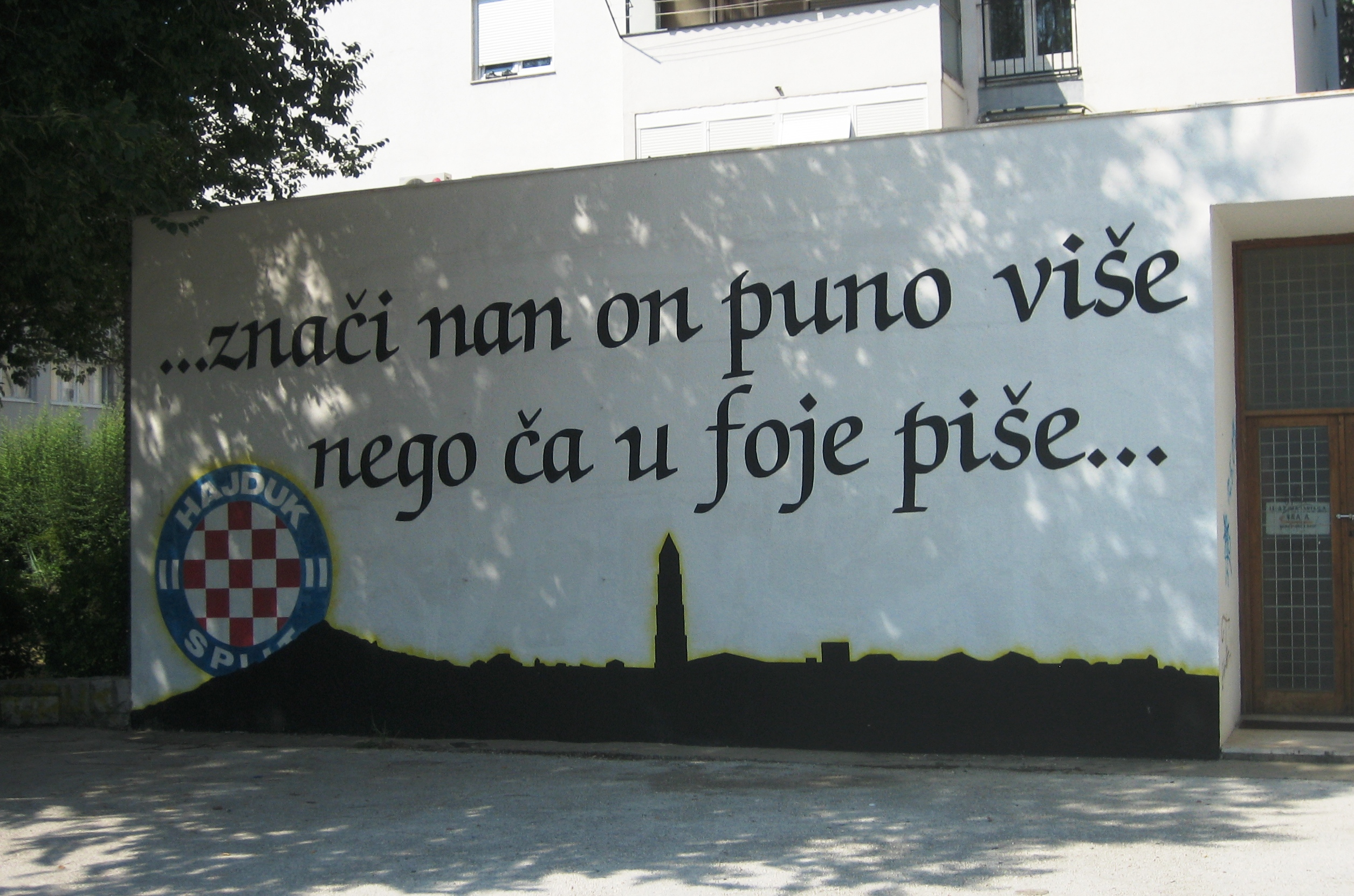 Grafit